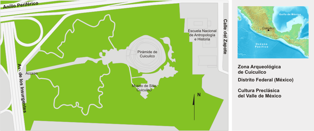 Plano de la zona arqueológica de Cuicuilco (México)